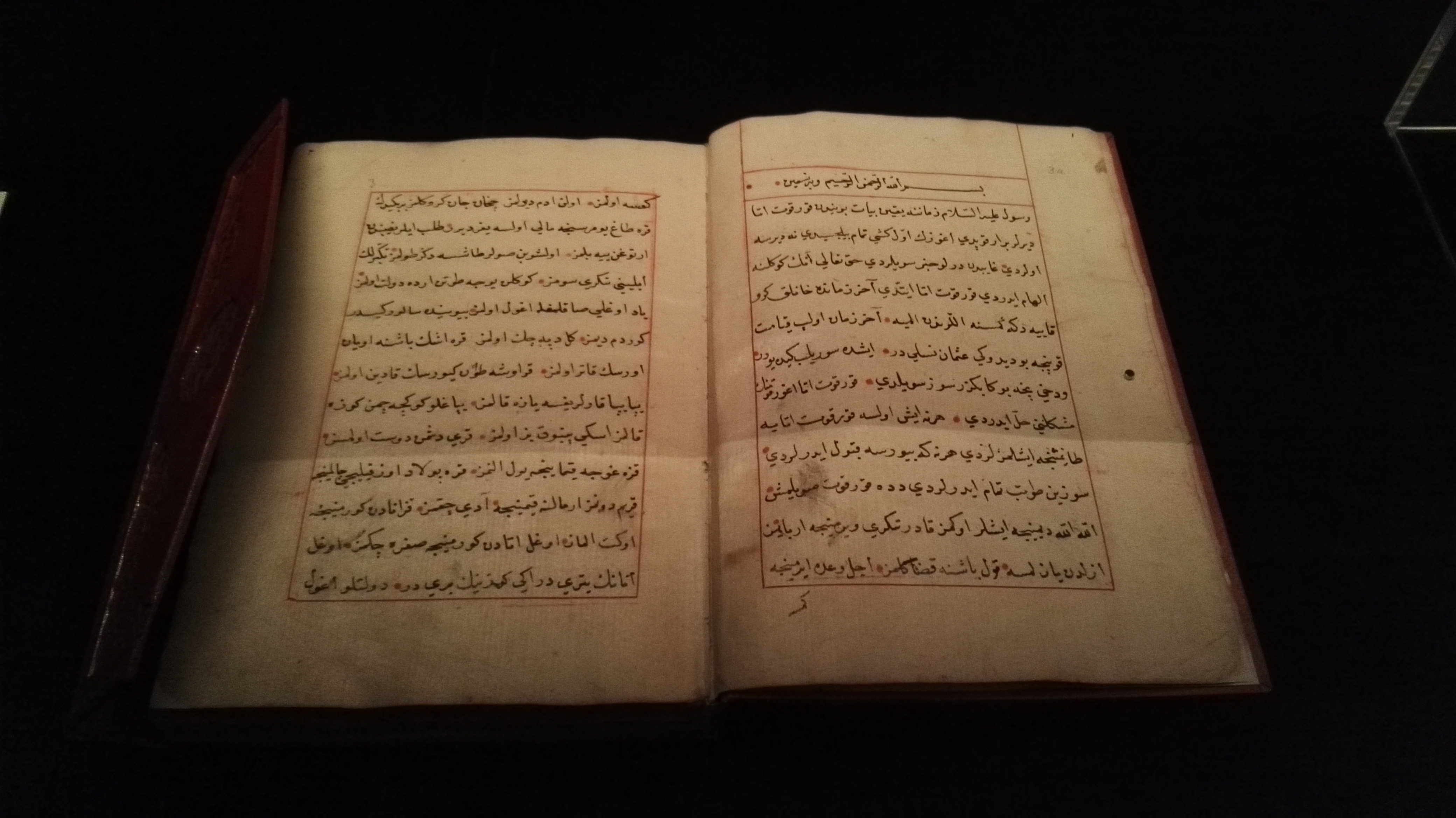 Kitab-i Dede Korkut; Nationalepos der Oghusen im Buchmuseum in Dresden; Oghusisch-türkische Handschrift auf Papier aus dem 16. Jahrhundert